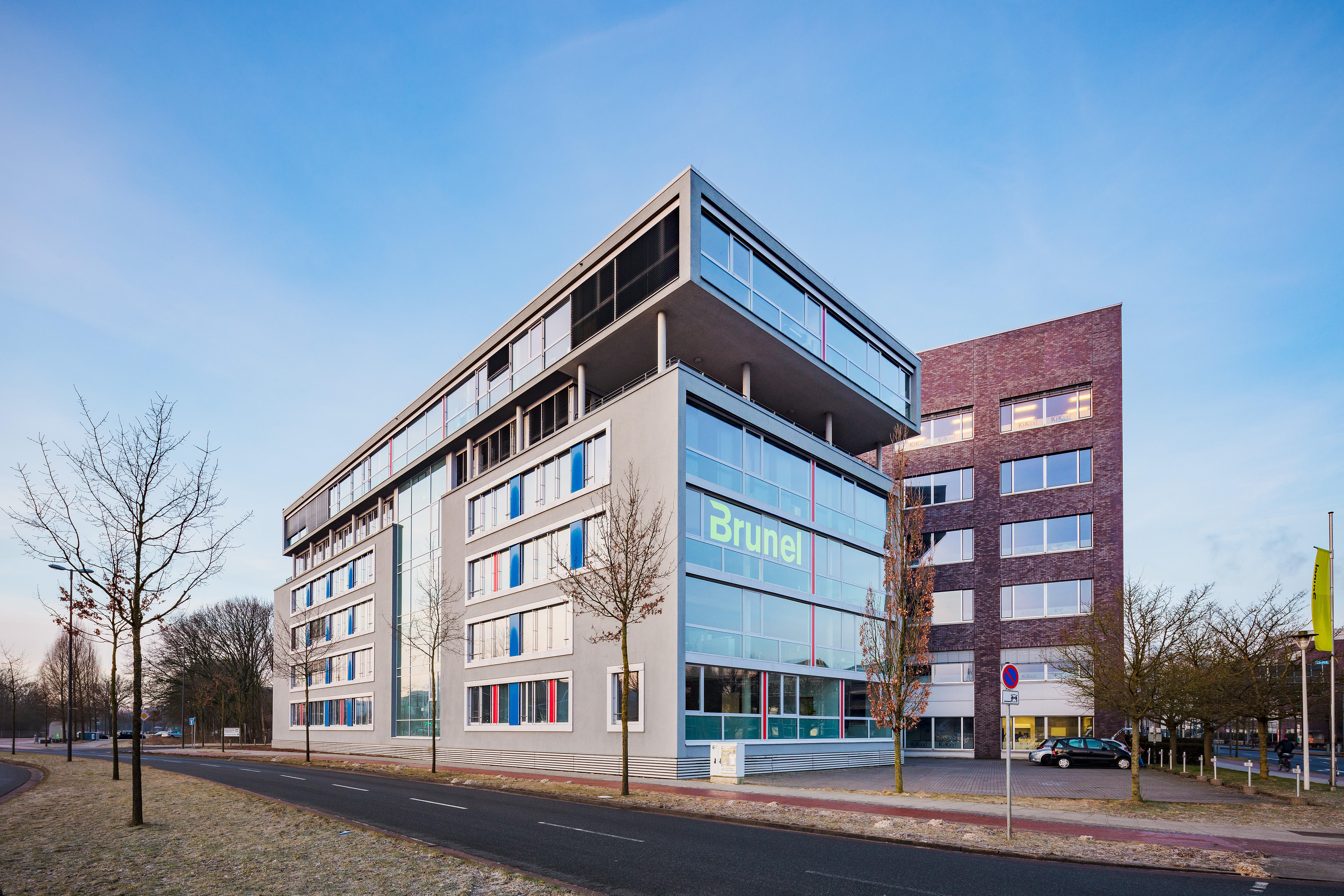 Zentrale der Brunel GmbH, Hermann-Köhl-Str. 1, 28199 Bremen